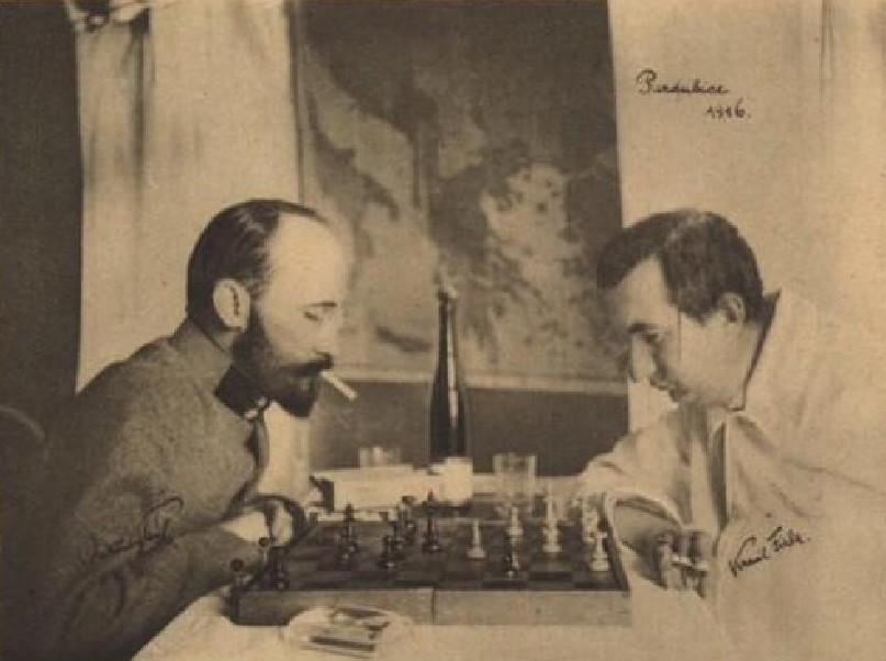 Kamil Fiala (1880-1930), český lékař a literární a hudební kritik